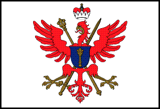 Flagge Kurfürstentum Brandenburg 17.Jahrhundert